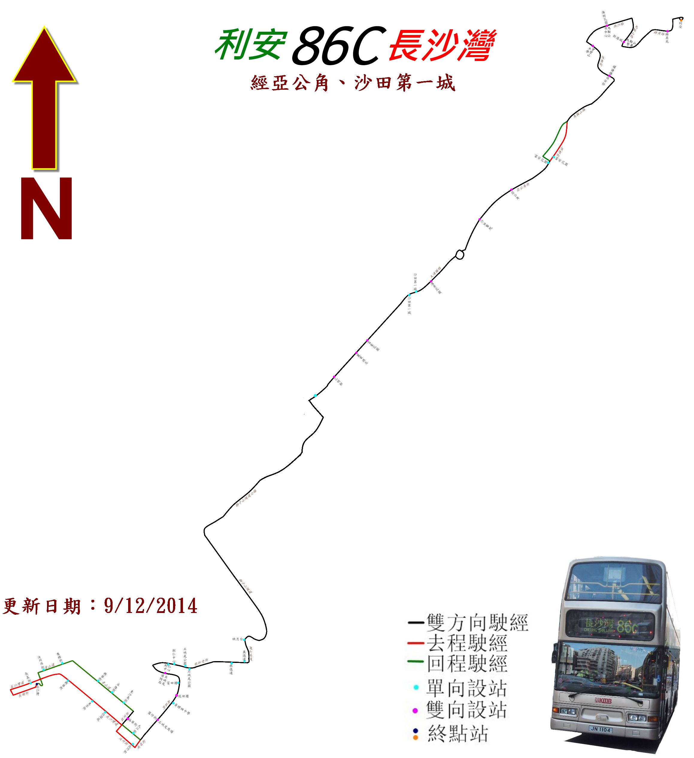 中文（香港）: 九巴86C線的走線圖